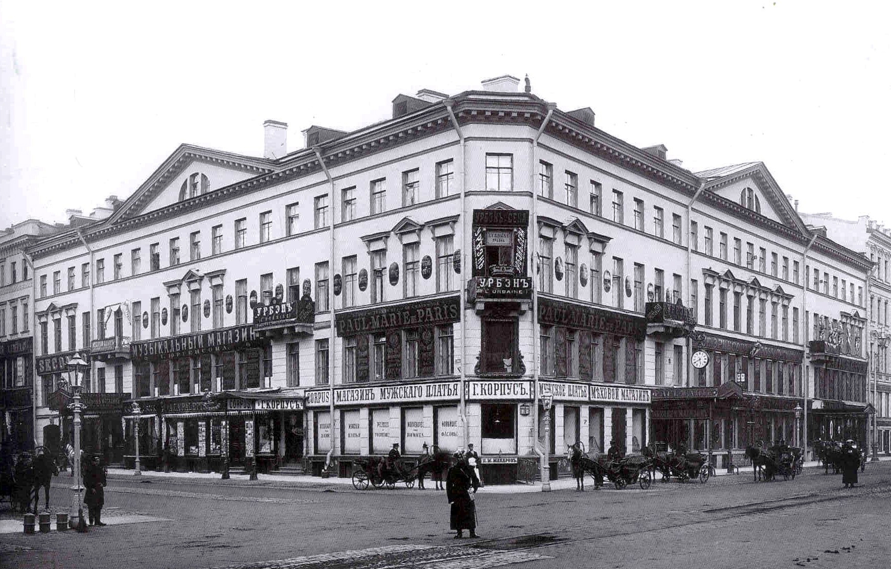 Невский пр., 13, фото около 1900 года